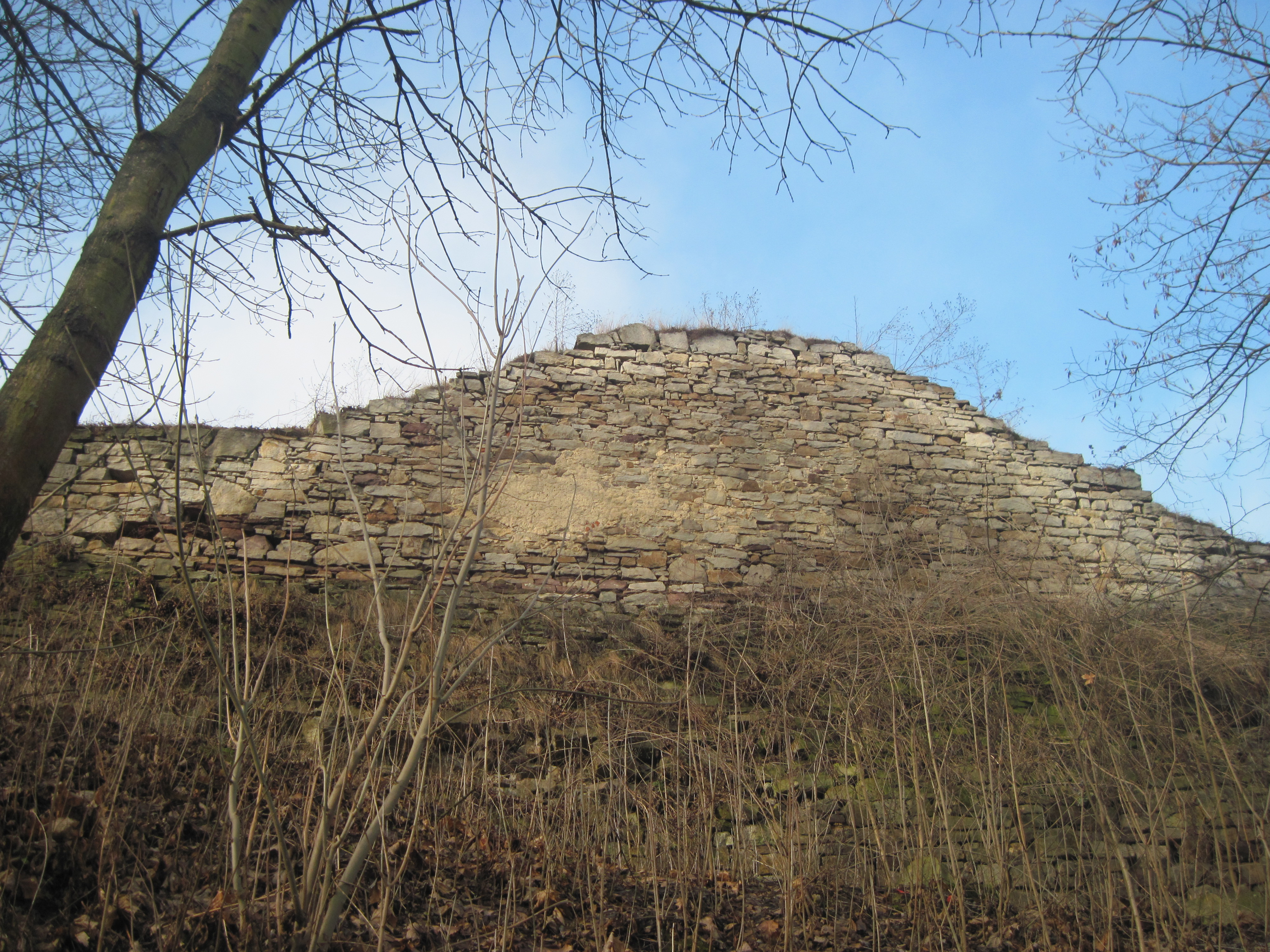 Залишки тиньку (штукатурки) на стіні Бучацького замку. Січень 2015